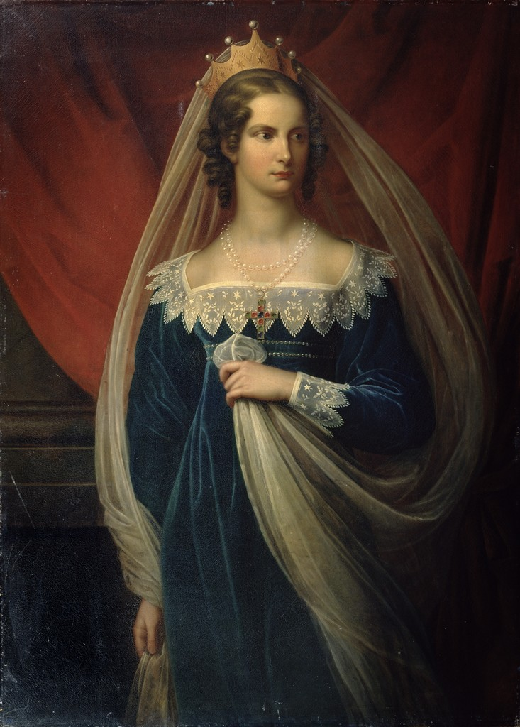 Ф.Г. Кюгельхен. Портрет принцессы Шарлотты Прусской (будущей императрицы Александры Федоровны). 1817. Поступил в 1865 из Таврического дворца. Ранее находился в Аничковом дворце (собрание императрицы Александры Федоровны).